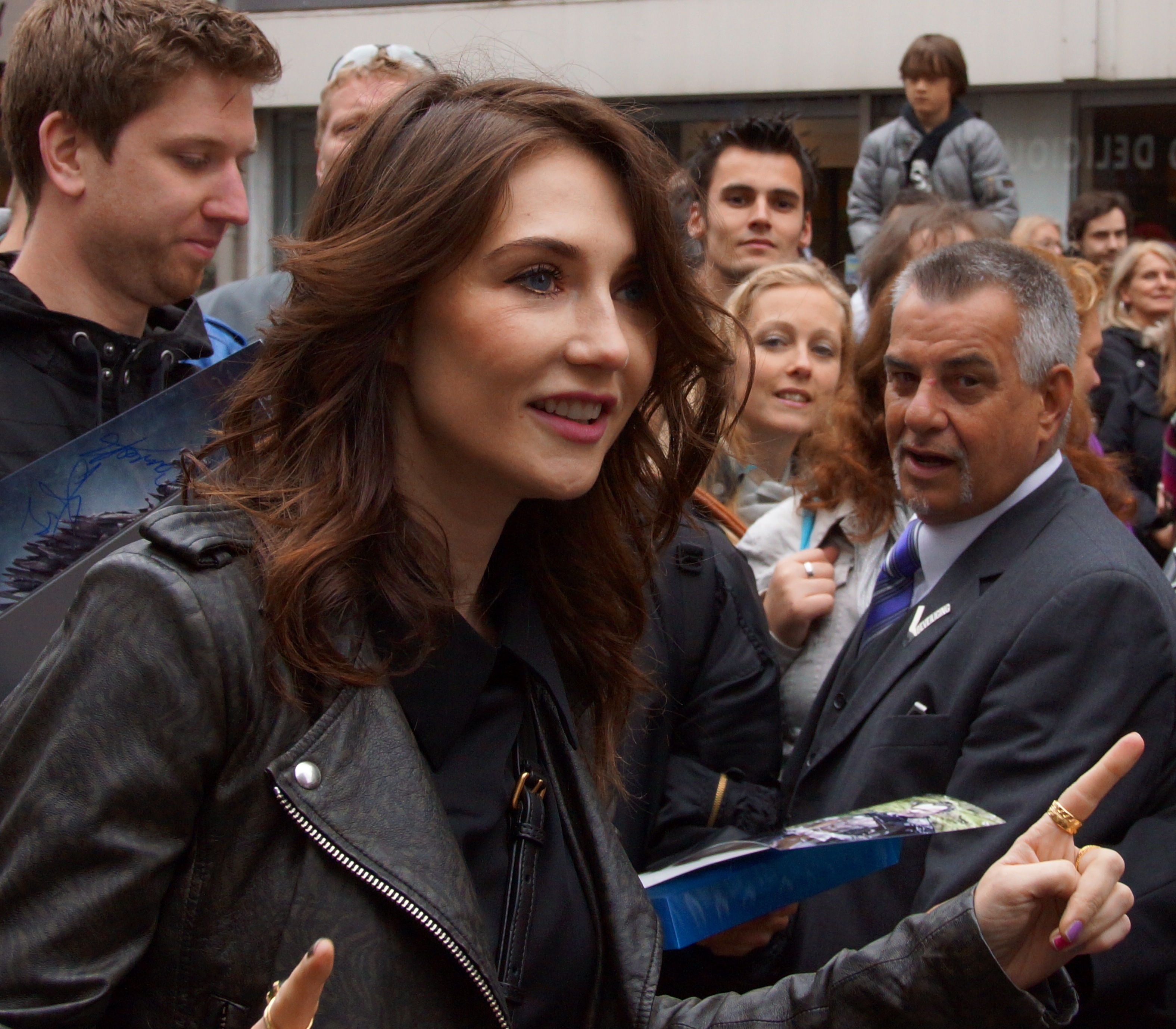 Carice van Houten 2013-2